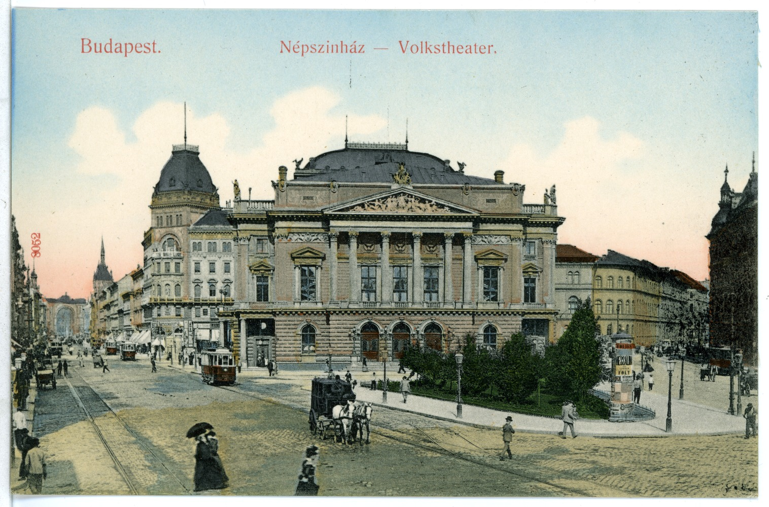 Budapest; Volkstheater This postcard is from publisher Brück & Sohn in Meißen ( postcard has a unique number 08052 and is available in a higher resolution at the publisher. This images was uploaded in a cooperation project between Wikipedians and the publisher.